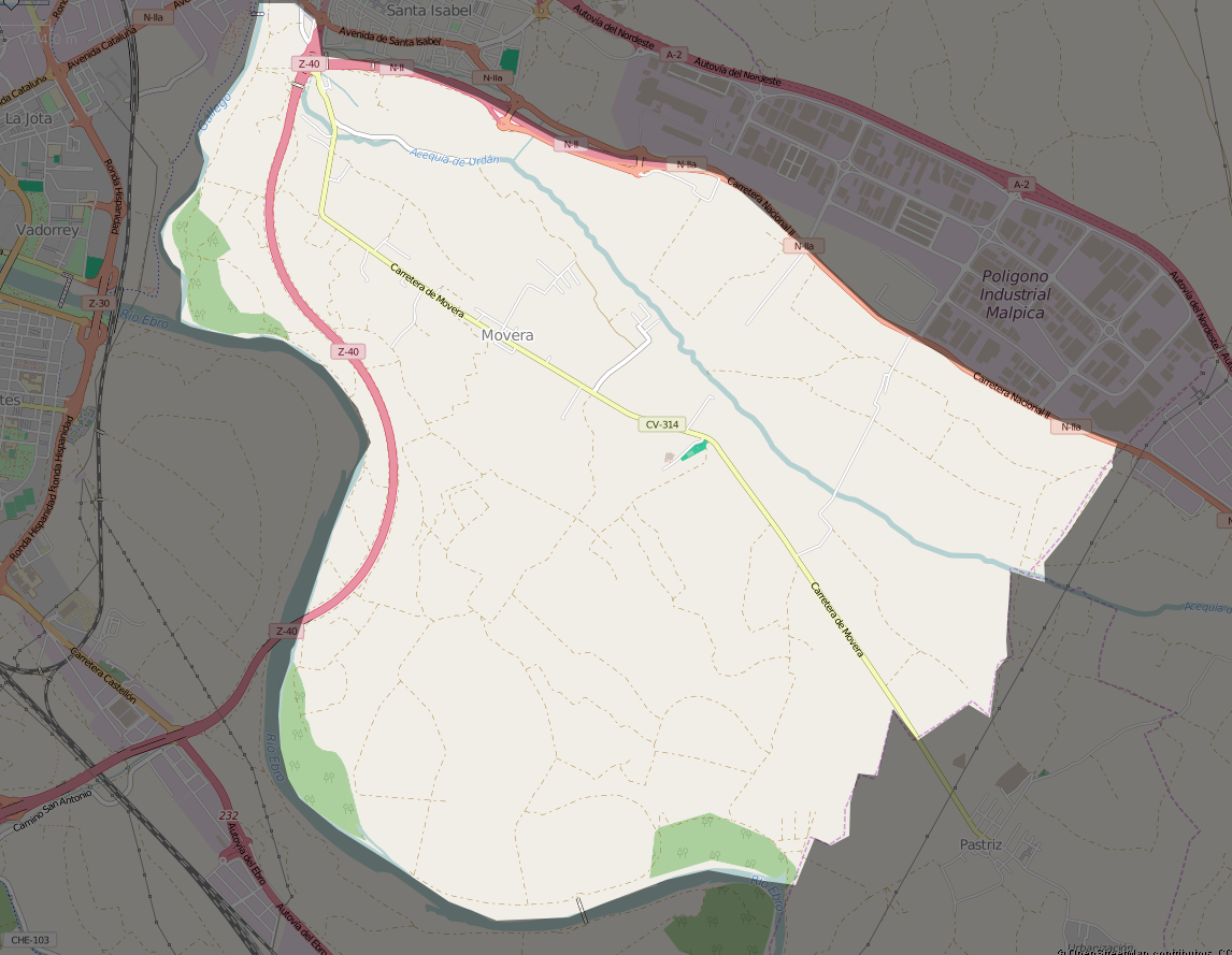 Mapa del distrito de Movera en Zaragoza.